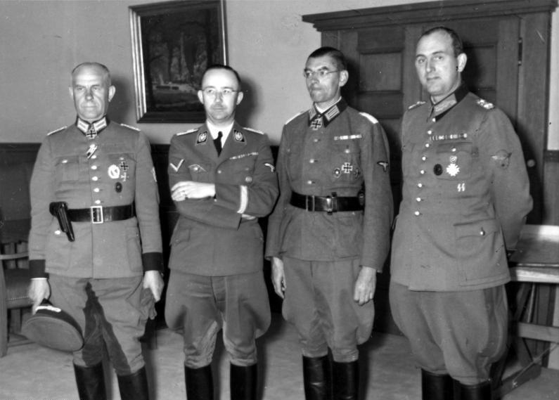 Reichsführer SS Himmler und General Daluege mit den Ritterkreuzträgern Oberstleutnant Giese [Bernhard Griese, l.] und Major Pannier